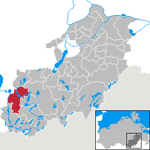 Roggentin in Mecklenburg-Vorpommern, Landkreis Mecklenburg-Strelitz